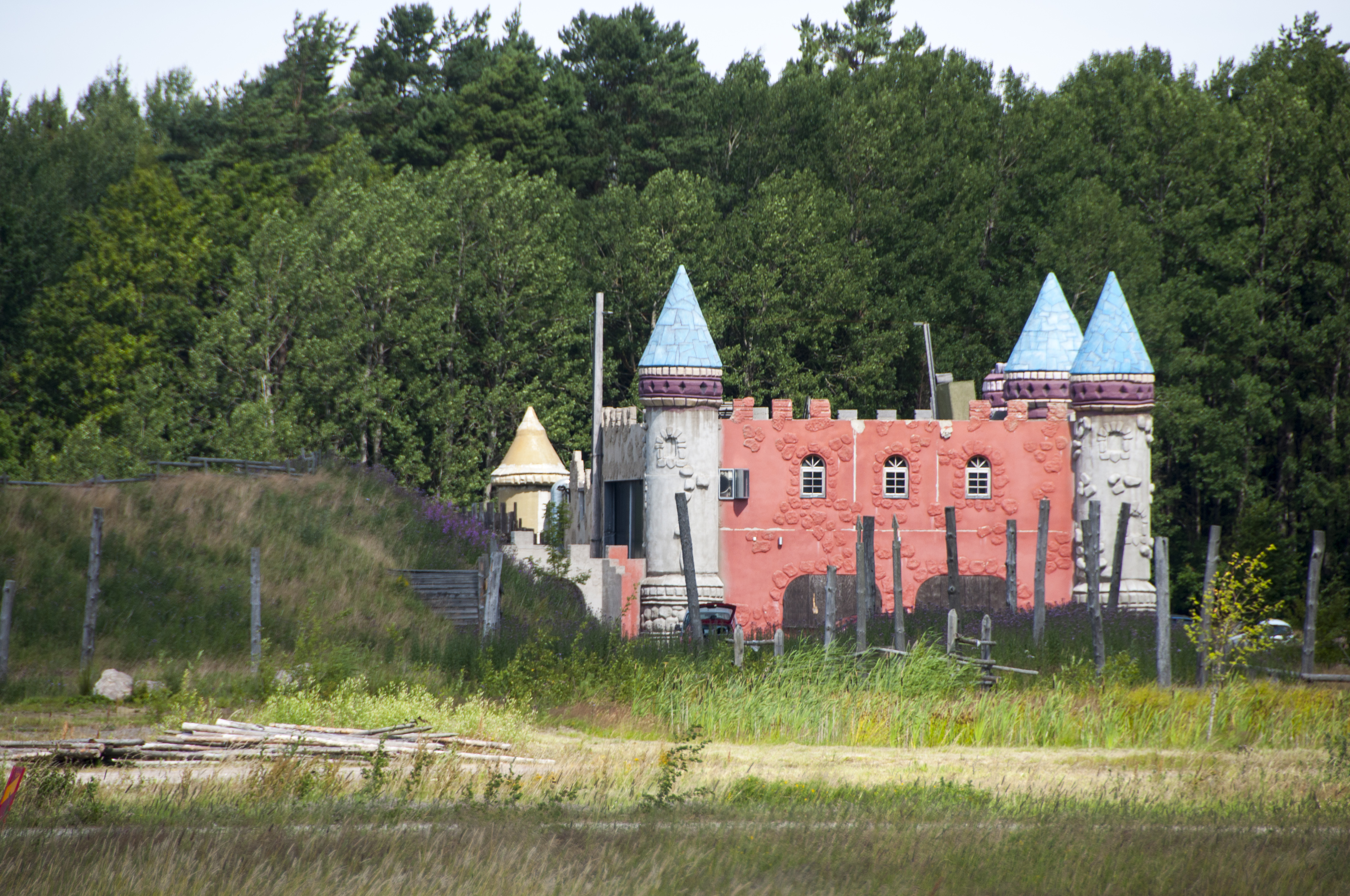 Nedlagda Äventyrslandet Kinnekulle (tidigare Medeltidens värld) utanför Götene